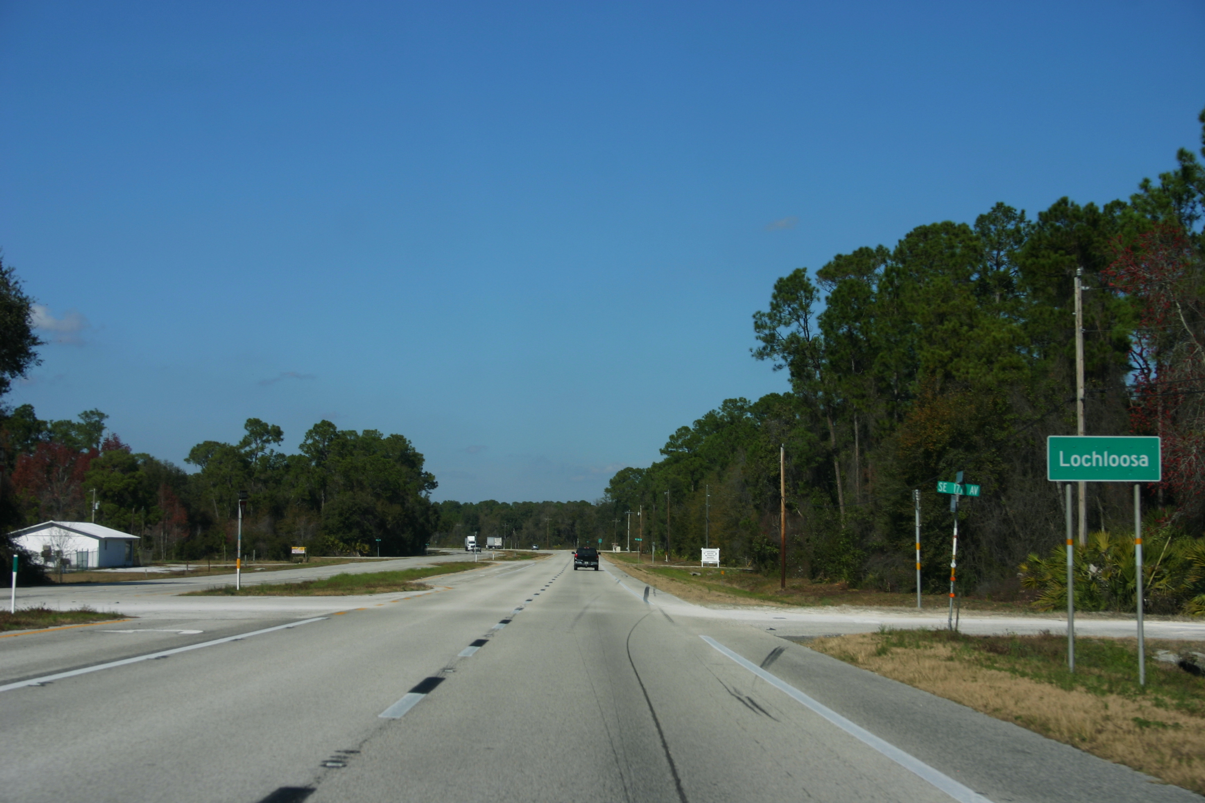 US 301 - Lochloosa Sign